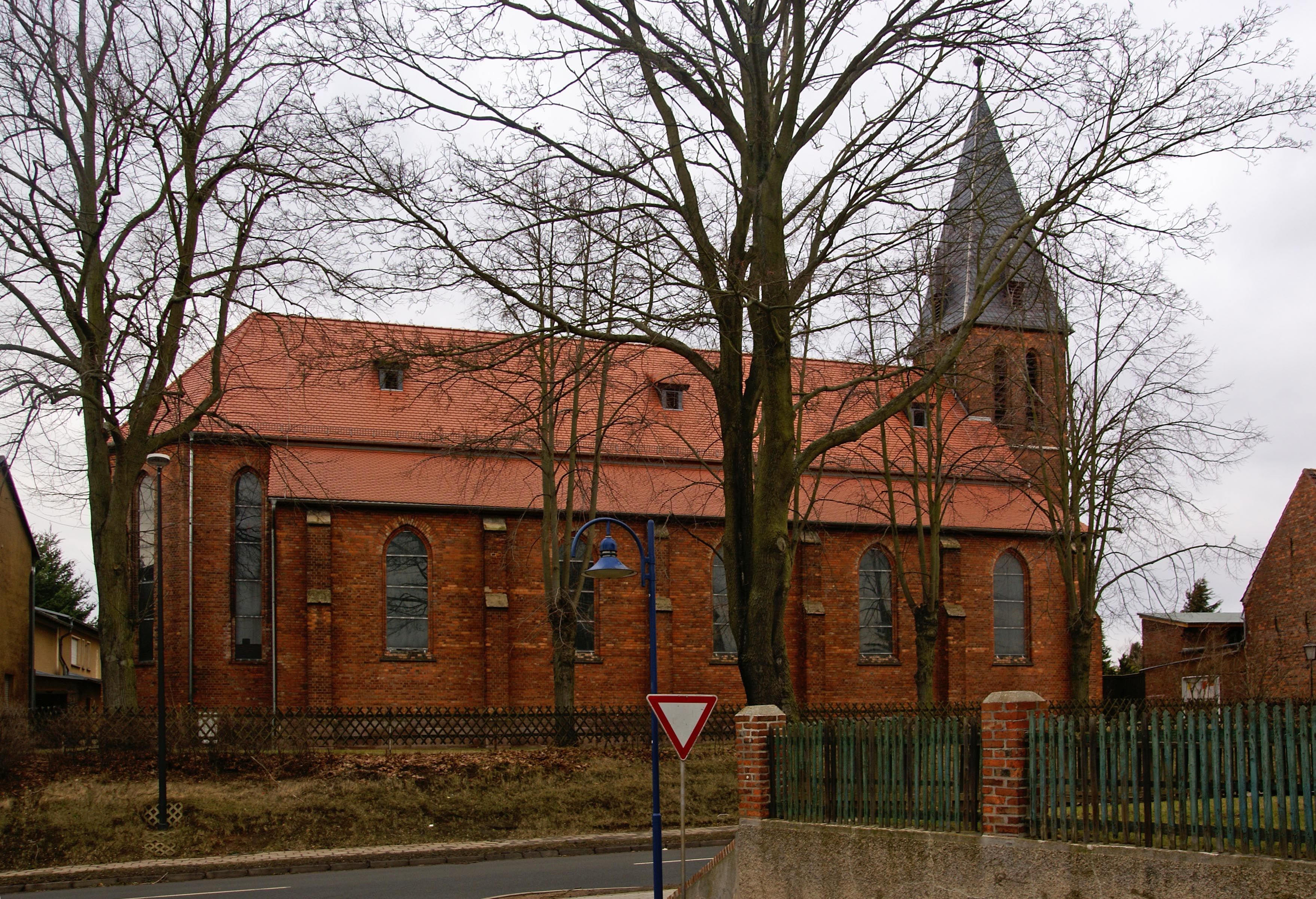 die katholische Kirche in Klostermansfeld